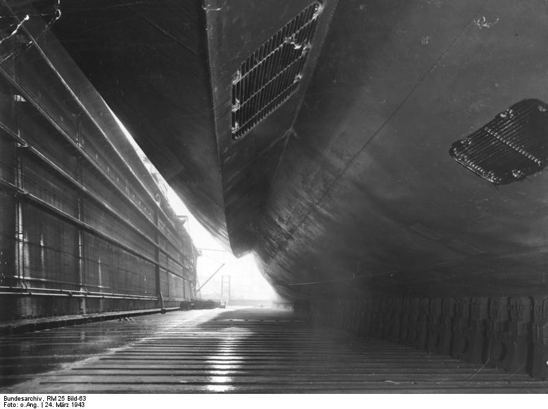 K 252 Ansicht nach vorn Kiel, d. 24.3.43 Deutsche Werke Kiel, Platte Nr. 22768